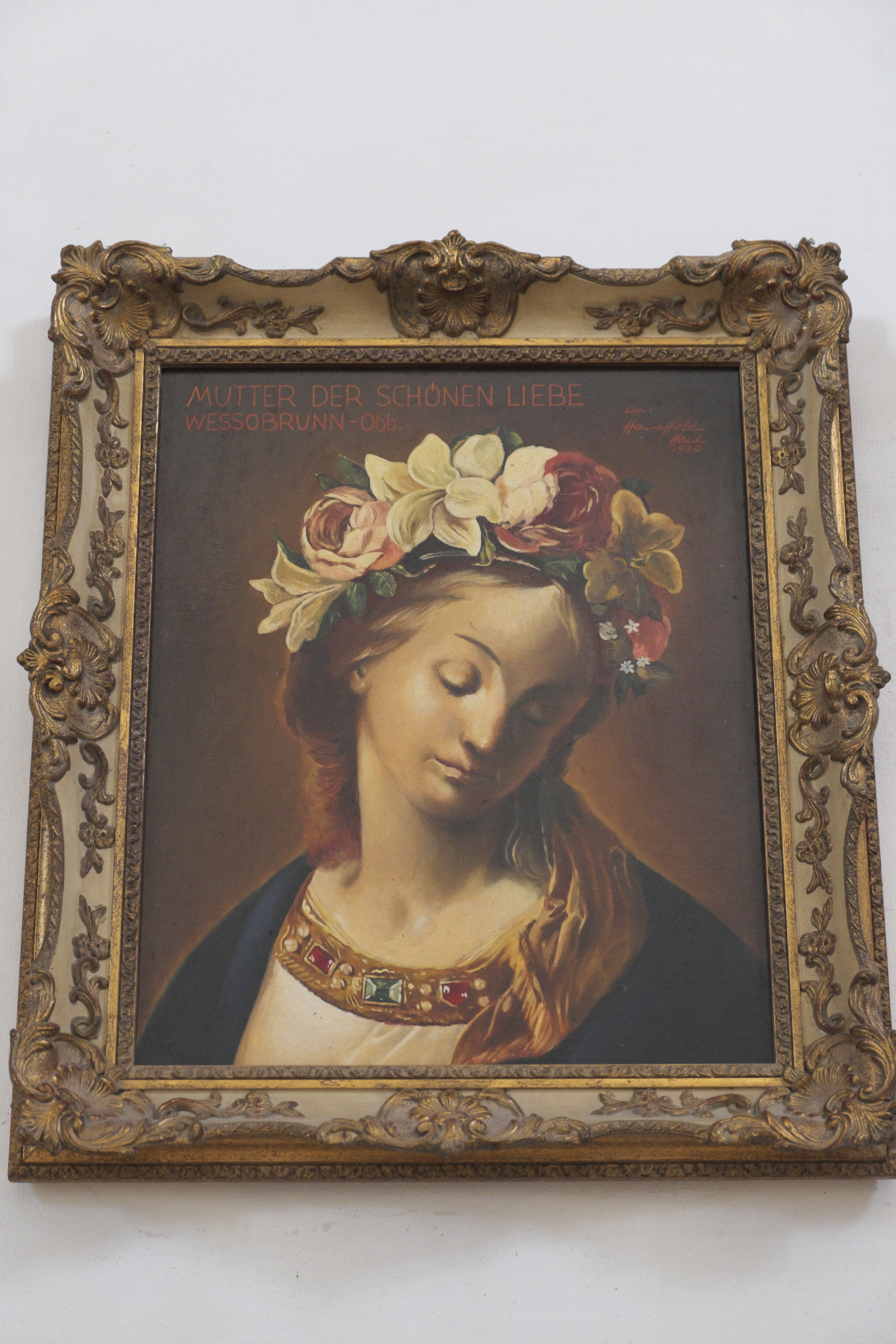 Katholische Wallfahrtskirche Mariä Schmerzen in Vilgertshofen im Landkreis Landsberg am Lech (Bayern/Deutschland), Gnadenbild Mutter der schönen Liebe